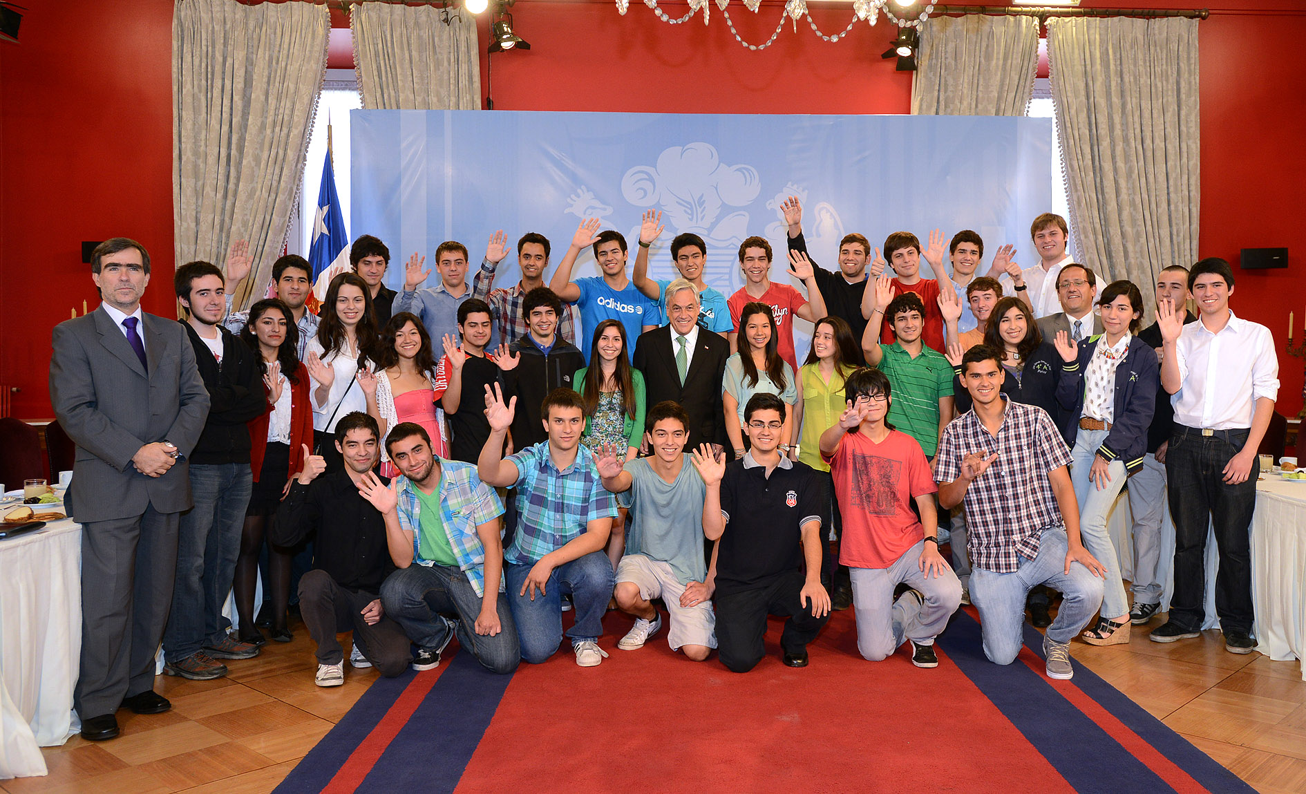 Sebastián Piñera desayuna con los mejores puntajes de la PSU 2012.